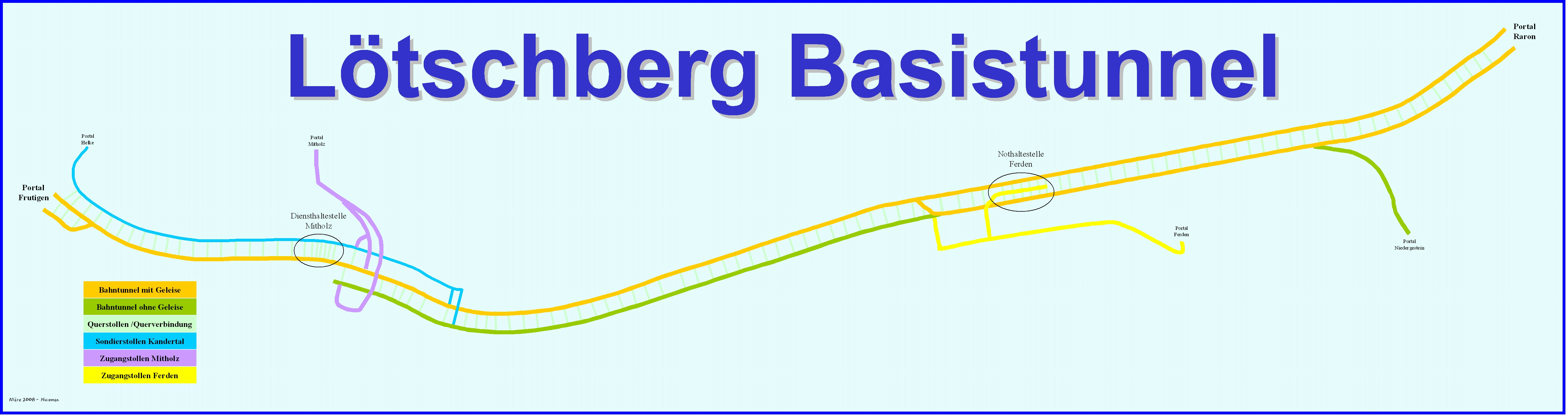 Der Lötschbergbasistunnel